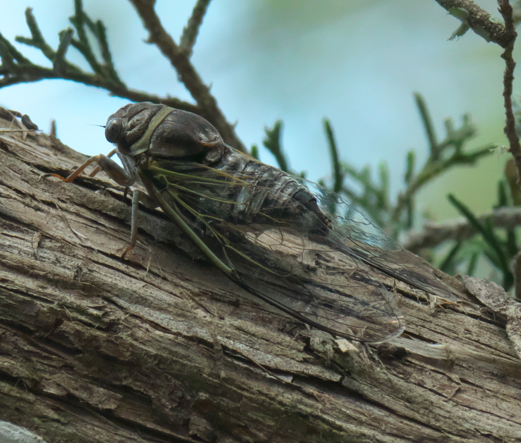 Diceroprocta viridifascia, Salt Marsh Cicada, ID Confidence: 98